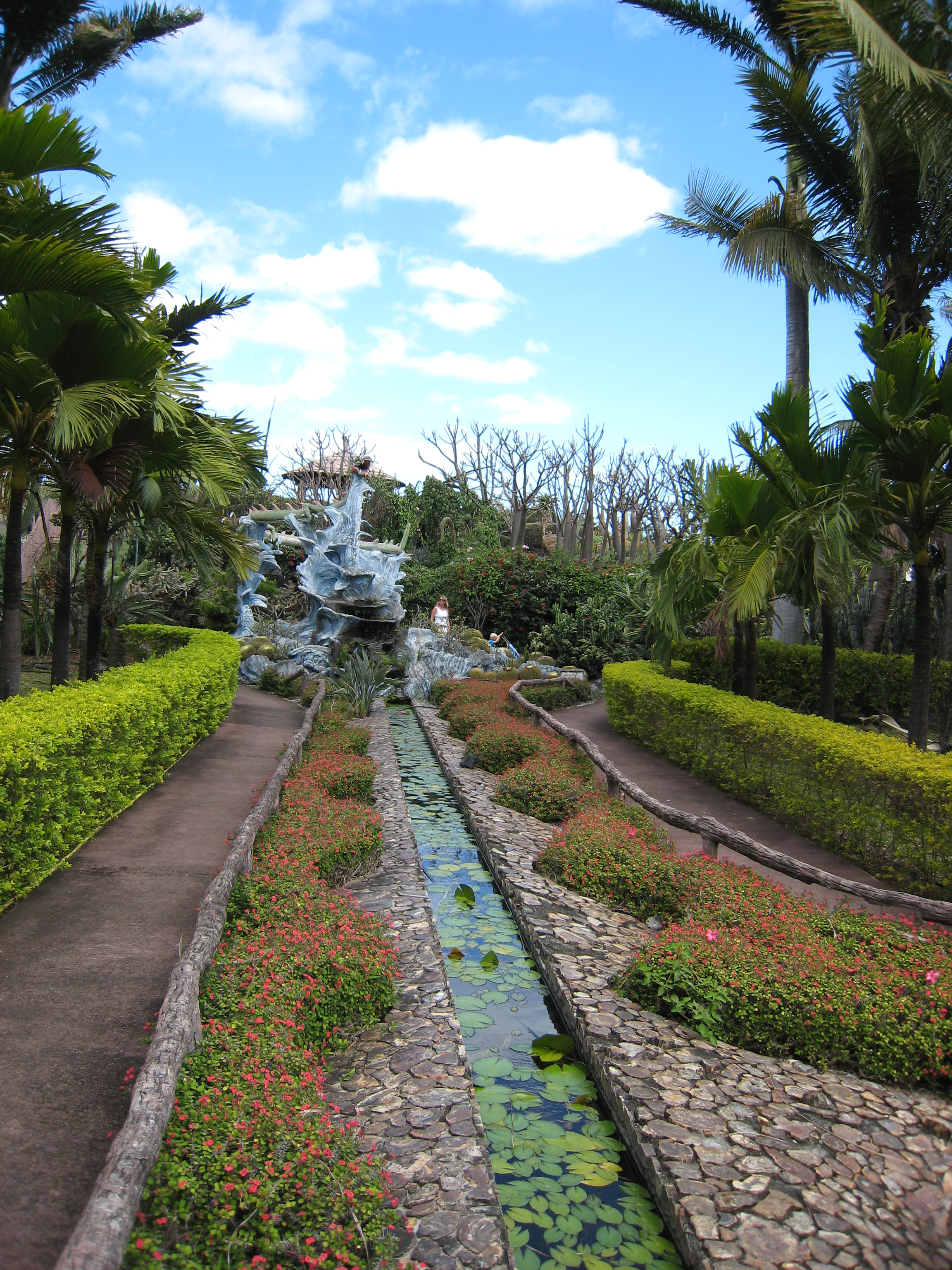 Statue de Dragon au Parc Exotica.